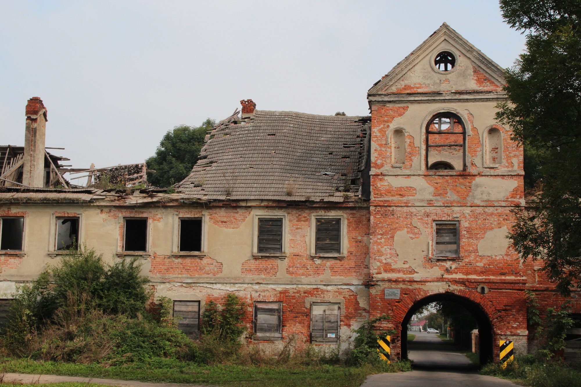 Różanka - oficyna (piętrowa), XIX